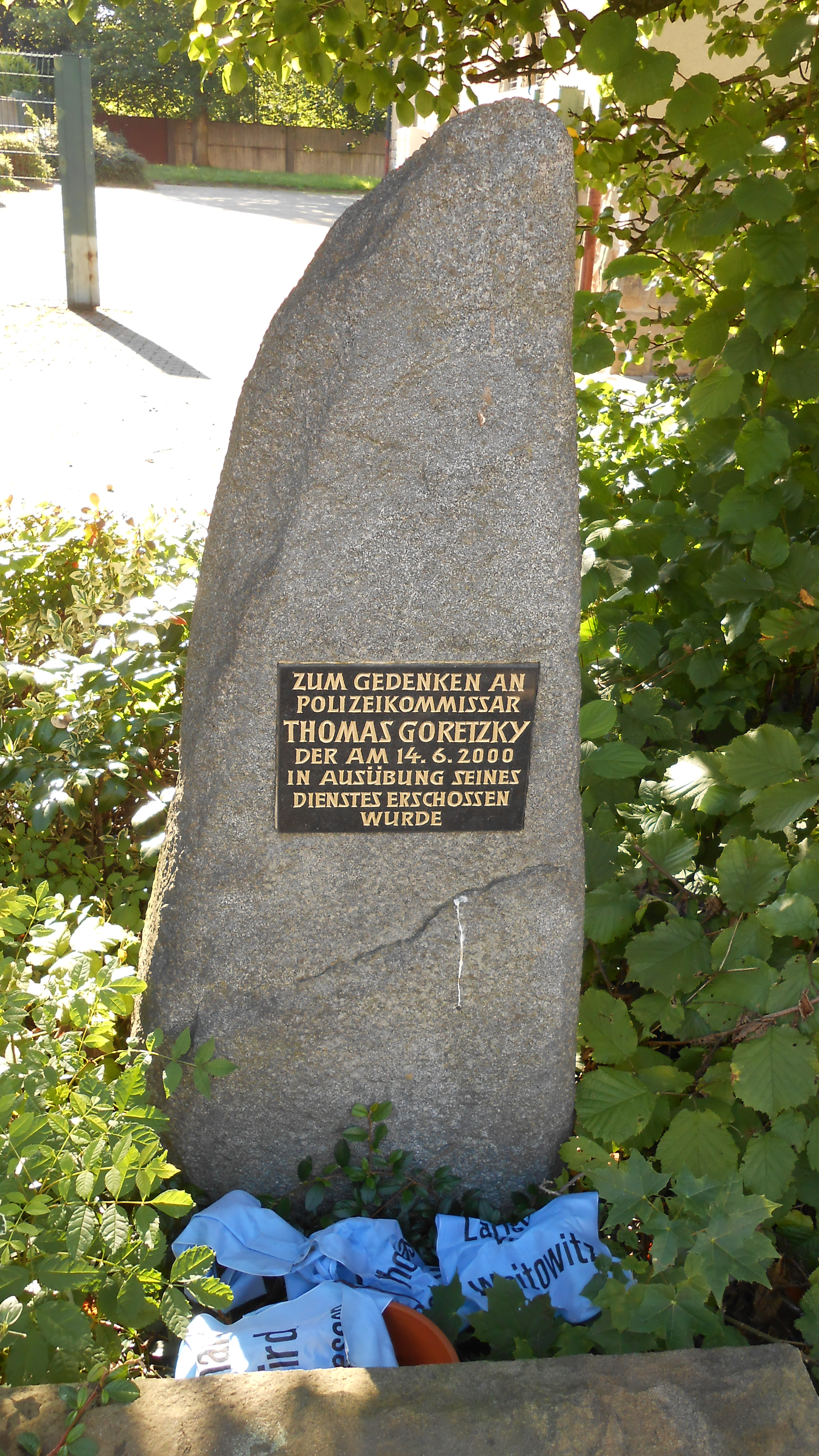 Denkstein für den ermordeten Polizisten Thomas Goretzky im Unteren Graffweg, Dortmund-Brackel.